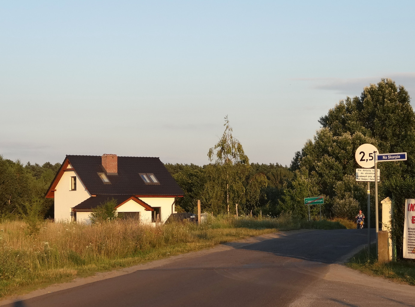 Czarnówczyn k. Bydgoszczy, gmina Osielsko, powiat bydgoski